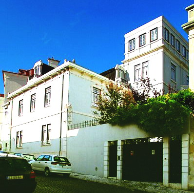 Menção Honrosa 1983 (Prémio Valmor) de uma habitação na Graça (Lisboa-Portugal) da autoria dos Arquitectos: António Marques Miguel, Manuel Graça Dias, e António de Campos Barbosa Magalhães. Foto cedida pelo autor. Upload por: Carlos Botelho